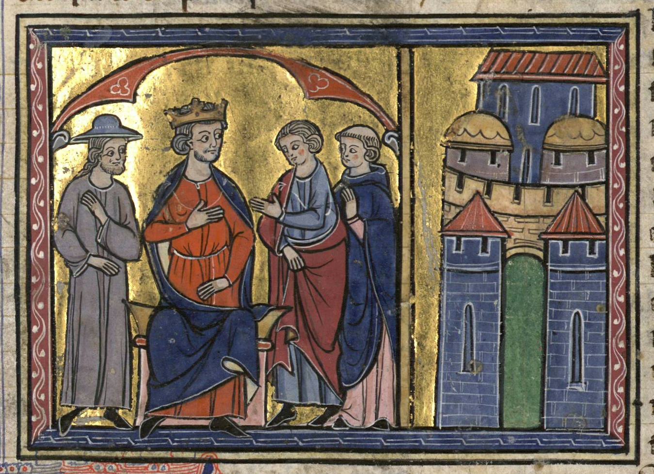 Alexis Ier Comnène et Hugues le Grand